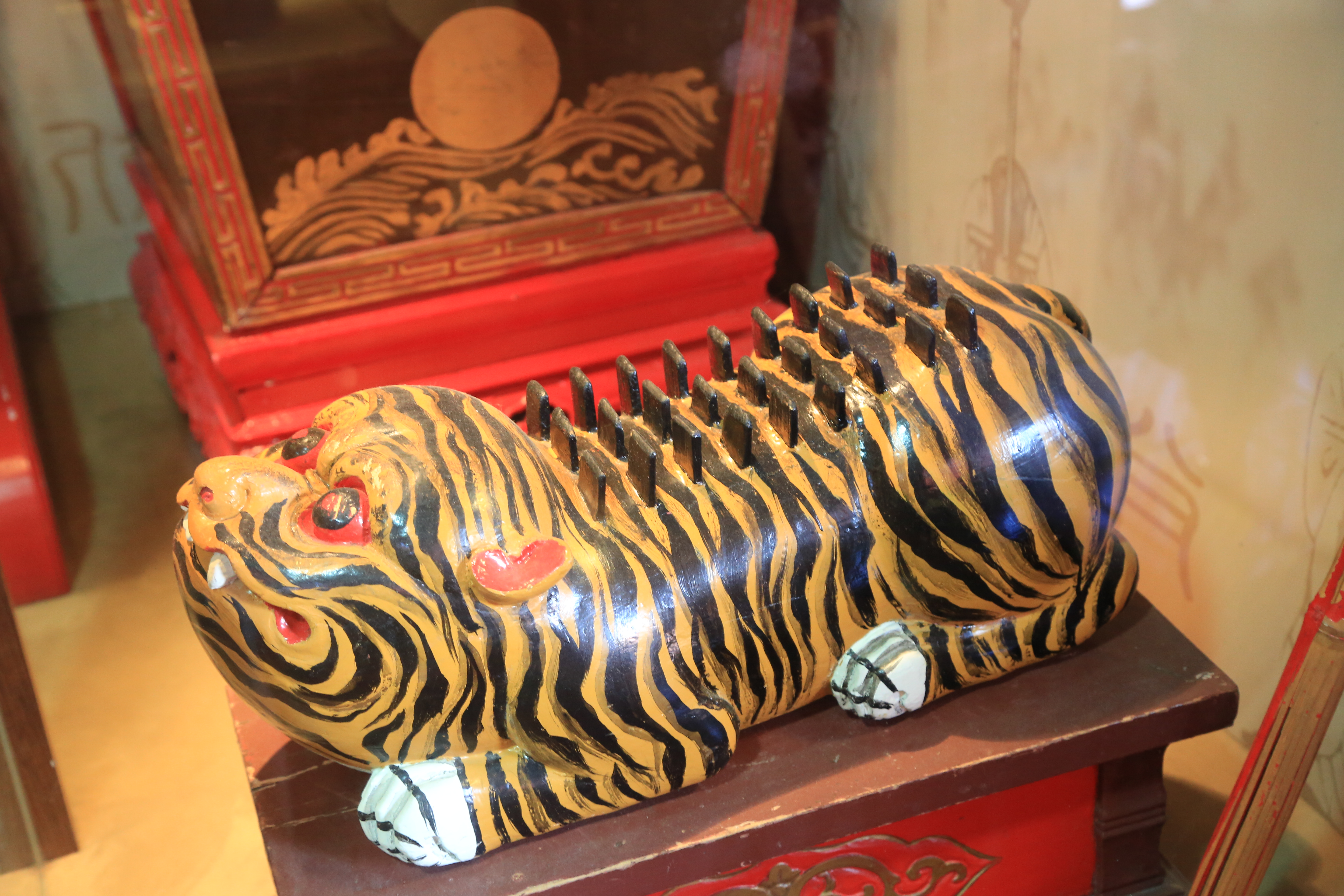 台南市孔廟文物收藏樂器: 敔 [Yu]